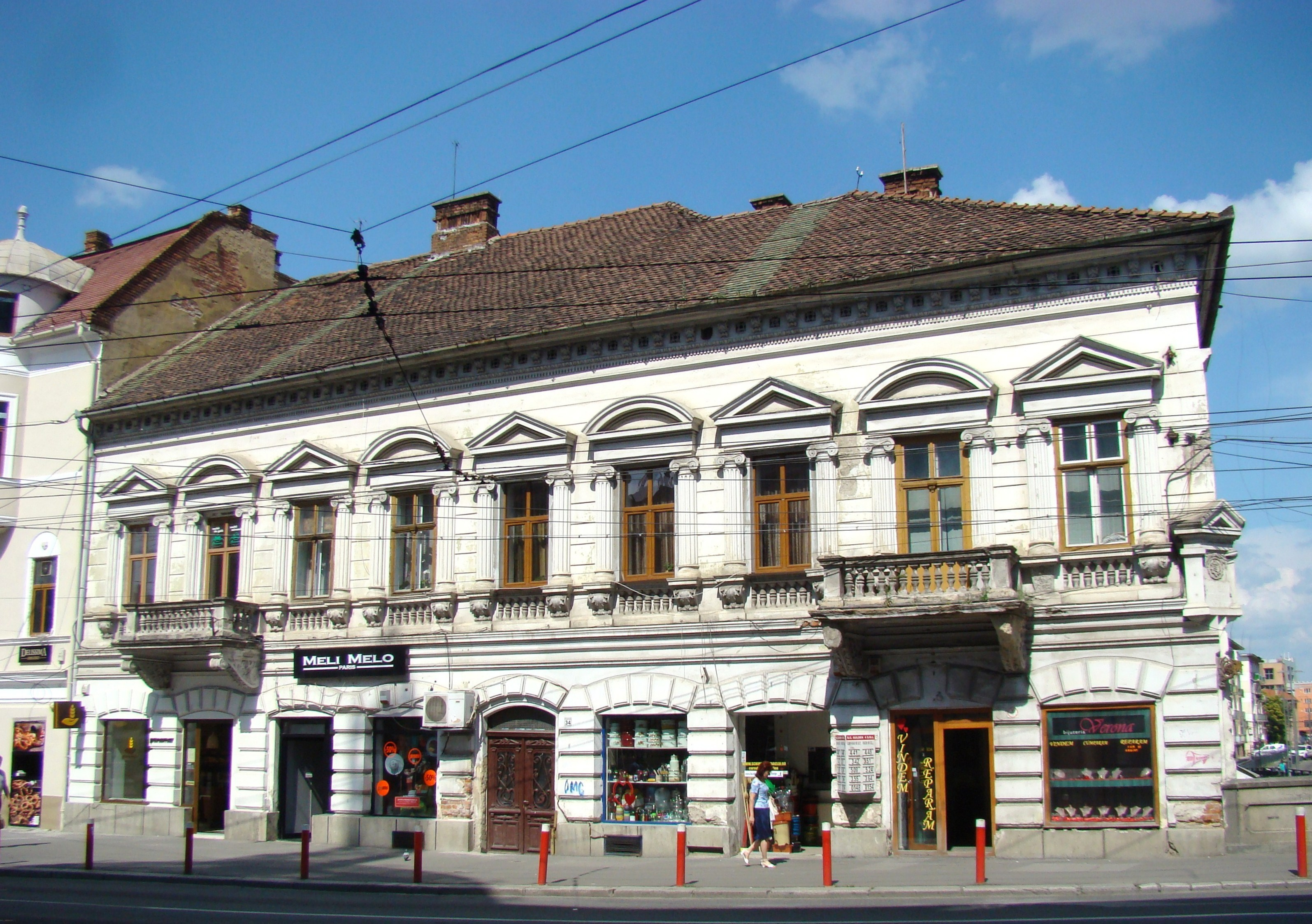 Clădire monument istoric, str. Regele Ferdinand nr.34 (Casa cu stema familiei Bathory)